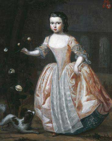 Portret van een meisje